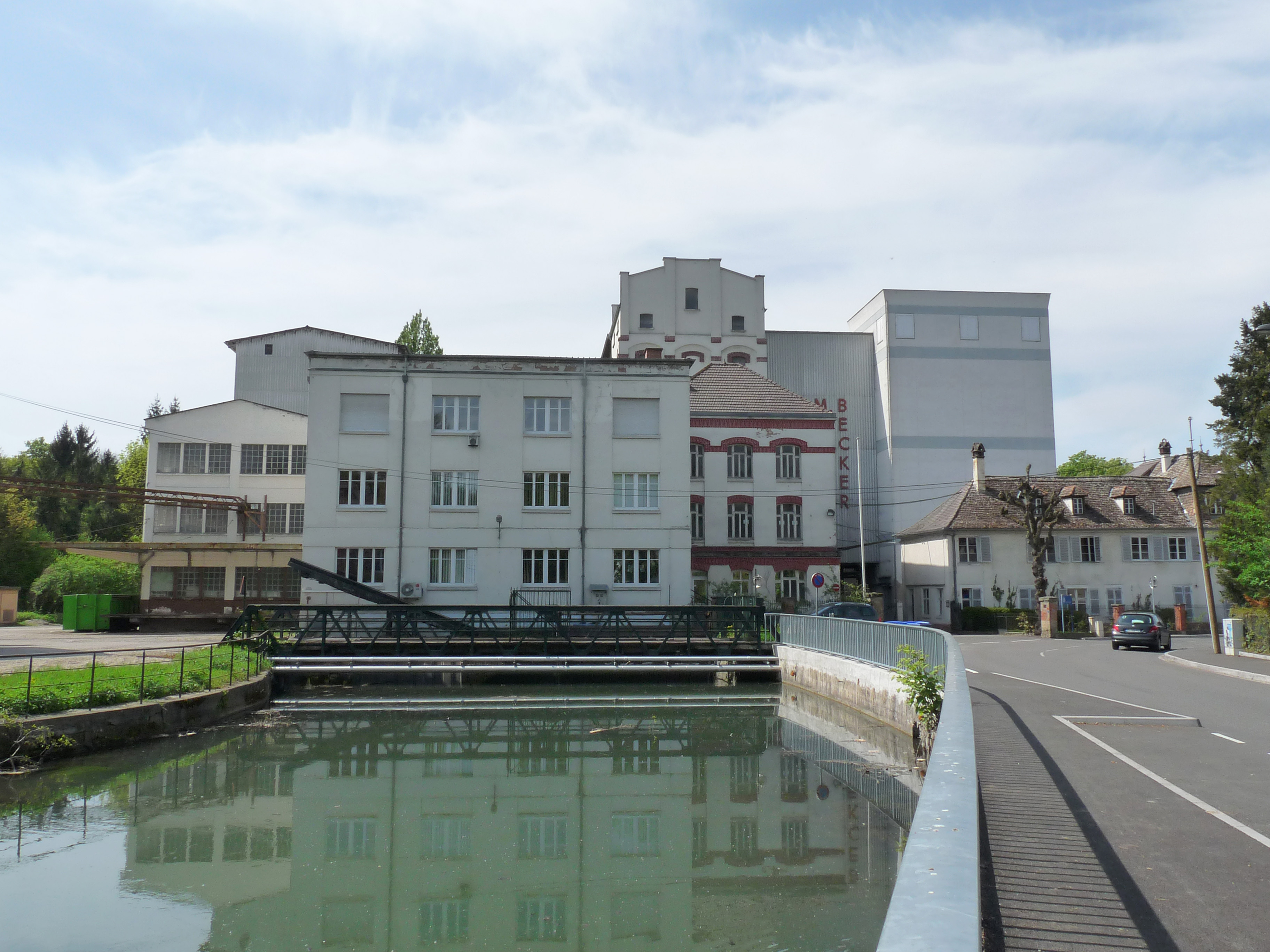 Strasbourg-Neuhof : site de l'ancien moulin de la Ganzau, aujourd'hui Grands Moulins Becker SA